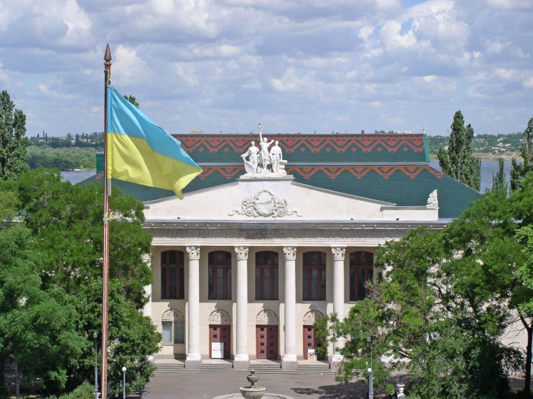 Nova Kakhovka - Budynok Kultury Author = Mike Khoudyakoff